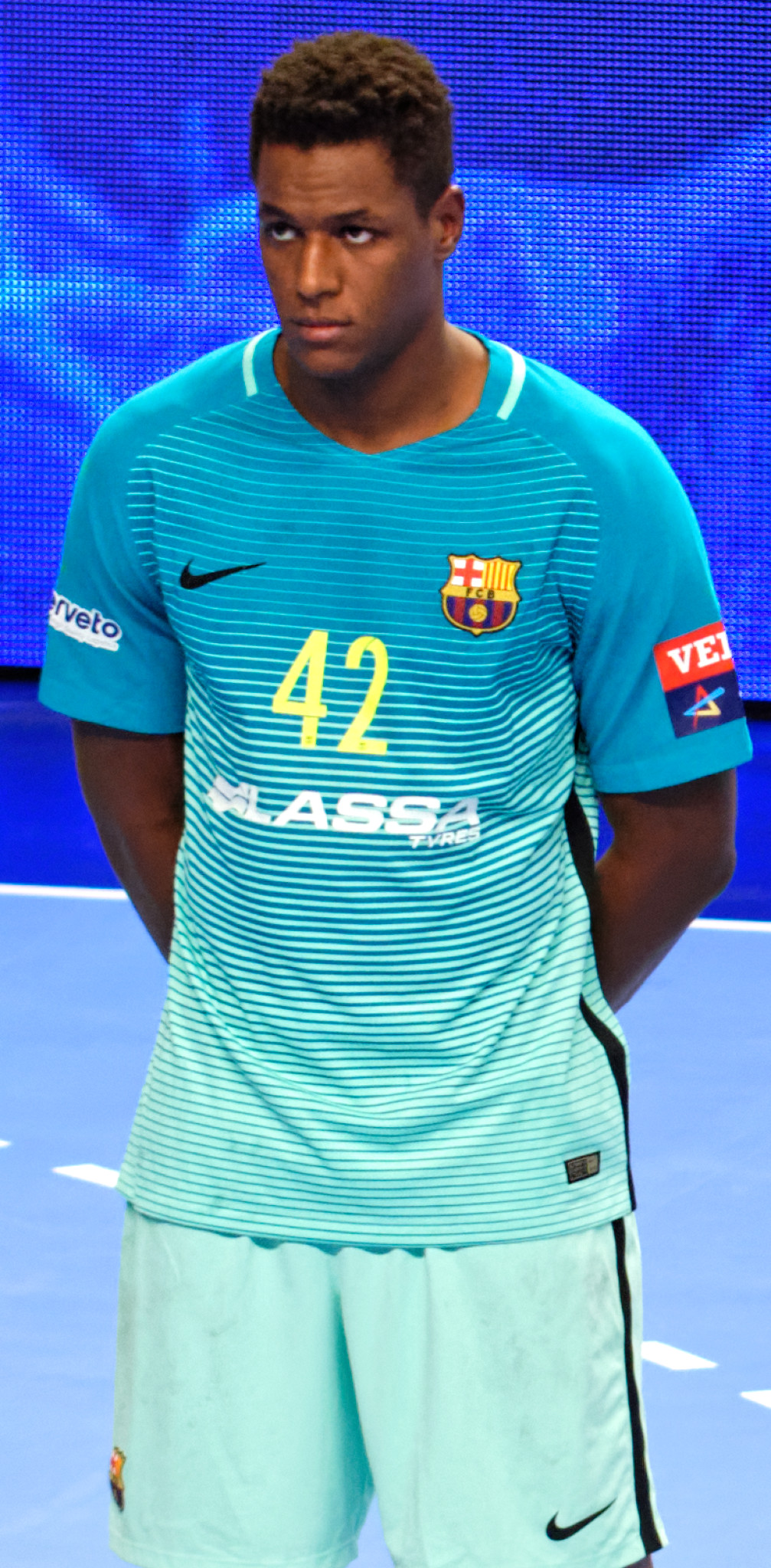 Rencontre de phase de groupe de la ligue des champions 2016-17 entre le PSG et le FC Barcelone. A Coubertin, le 12 novembre 2016.